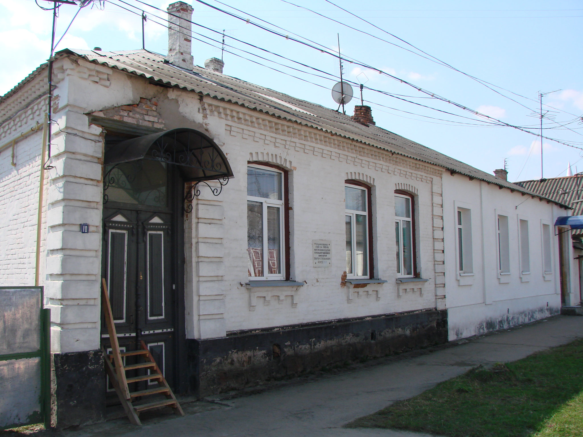 Будинок, в якому жив В. С. Косенко — український композитор., Житомир, Вул. Дмитрівська, 10